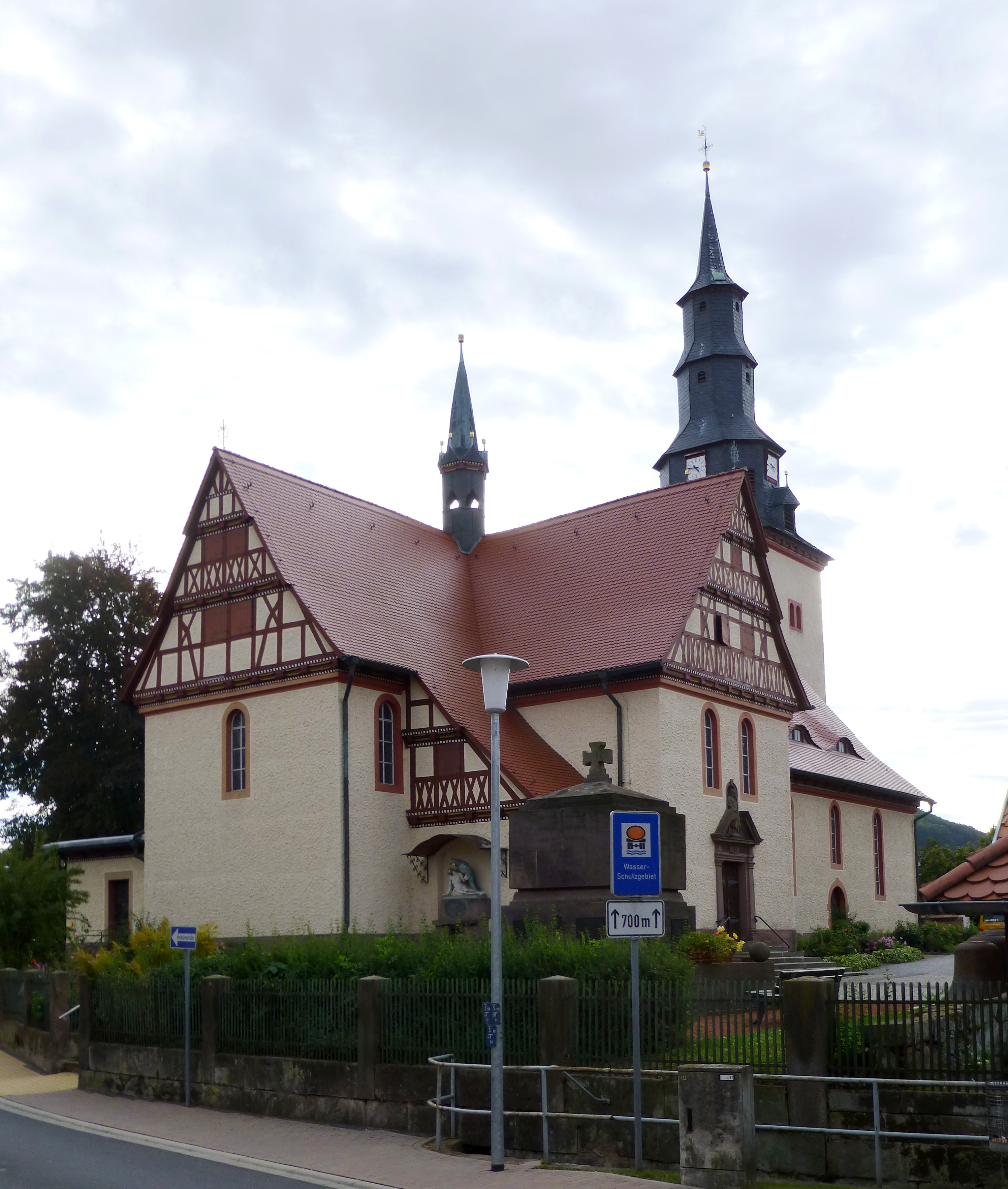 Katholische Pfarrkirche St. Jakobus in Uder, Landkreis Eichsfeld, Thüringen. Erbaut 1910